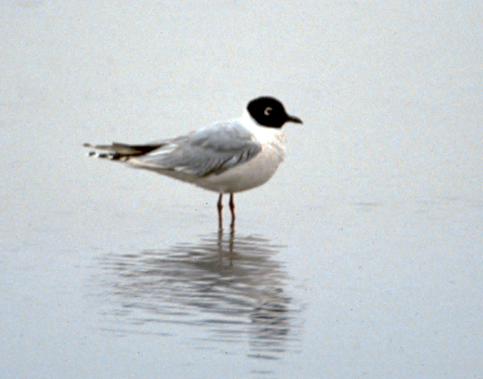 Saunders's Gull Chroicocephalus saundersi in Hong Kong